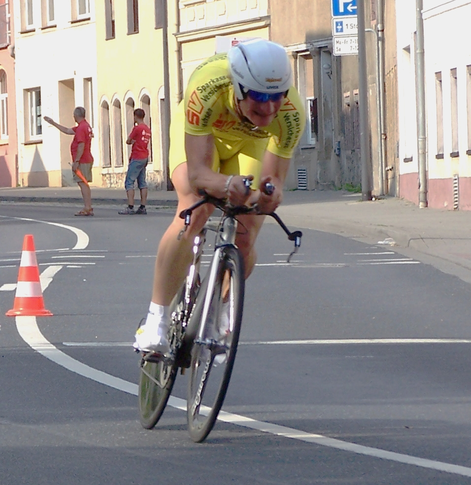 Die Aufnahme entstand beim Einzelzeitfahren der Sachsen-Tour 2008 in Großenhain